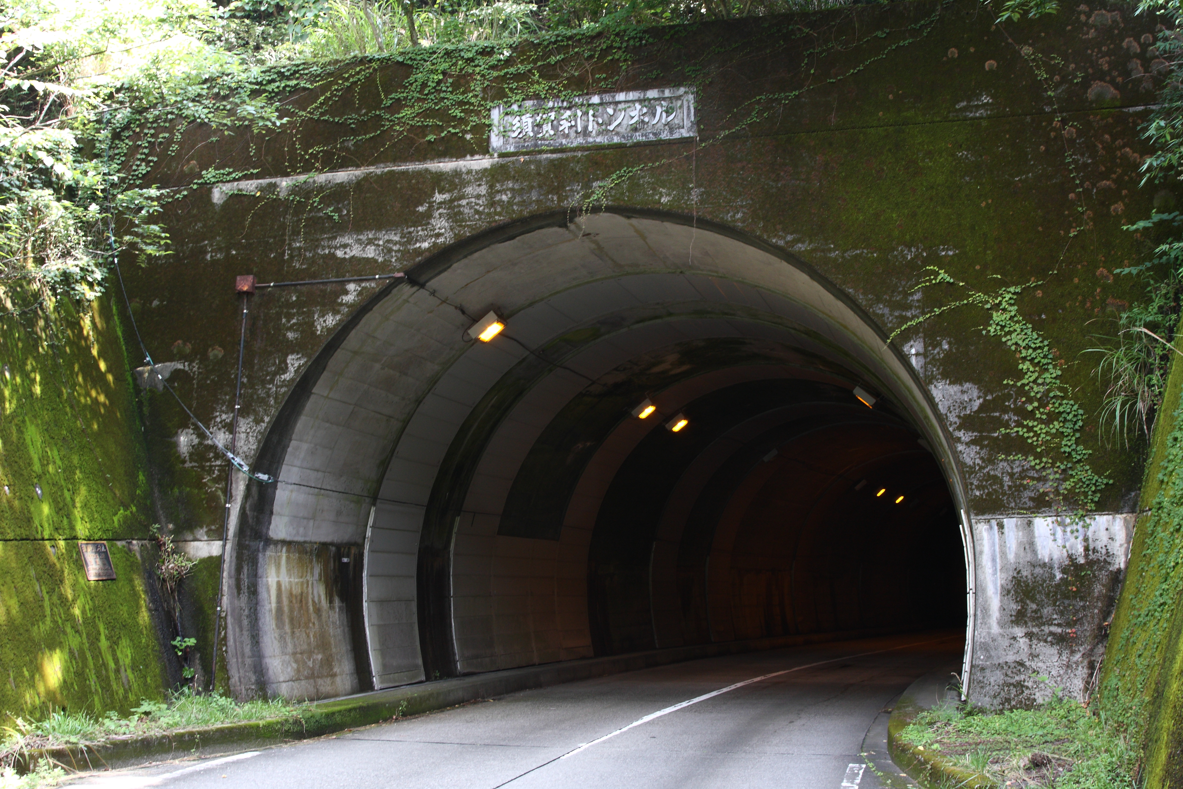 須賀利トンネル 三重県道202号須賀利港相賀停車場線 三重県尾鷲市須賀利町